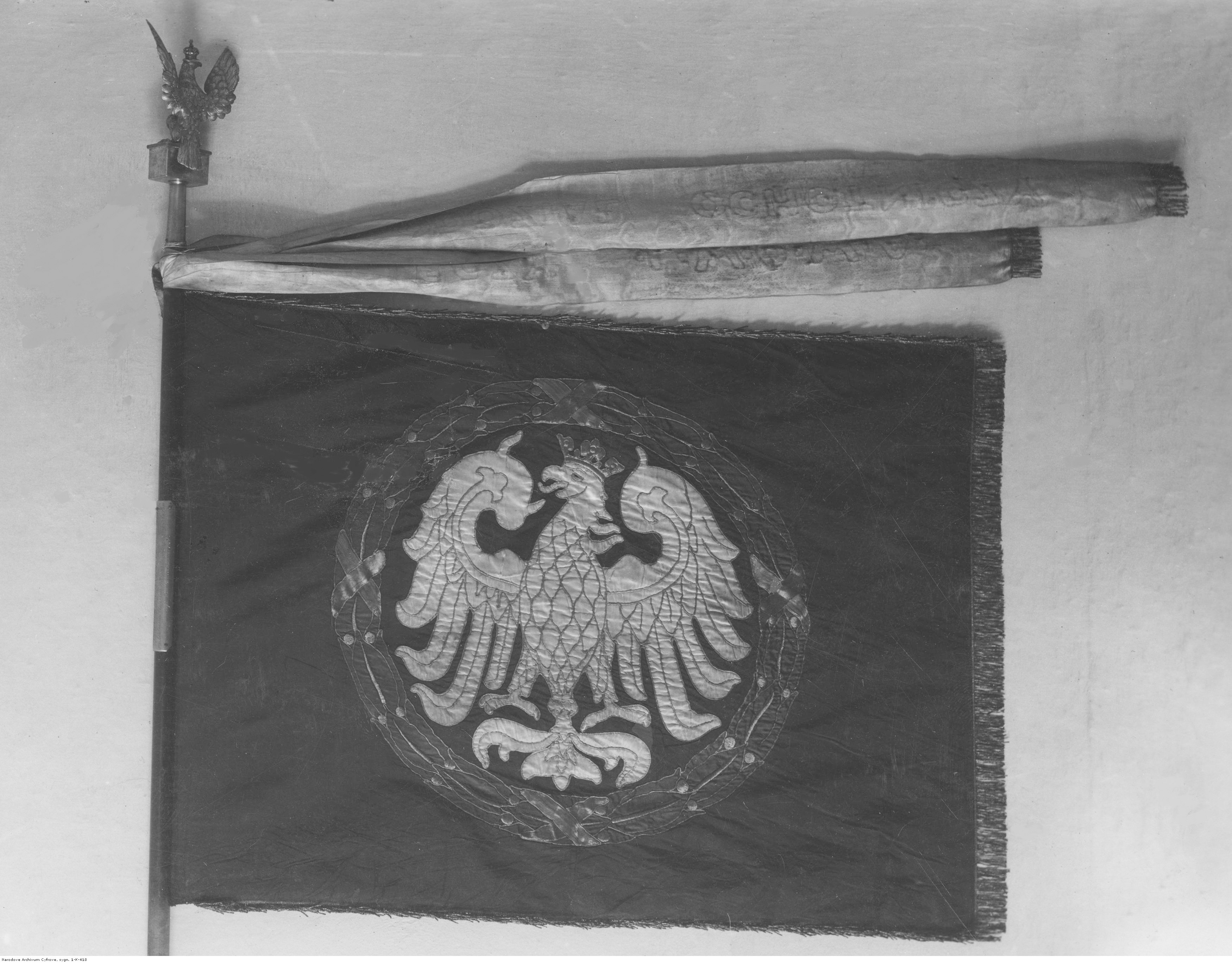 Sztandar 19 Pułku Piechoty Odsieczy Lwowa w Muzeum Wojska Polskiego w Warszawie; maj 1928. Koncern Ilustrowany Kurier Codzienny - Archiwum Ilustracji. Sygnatura: 1-K-418